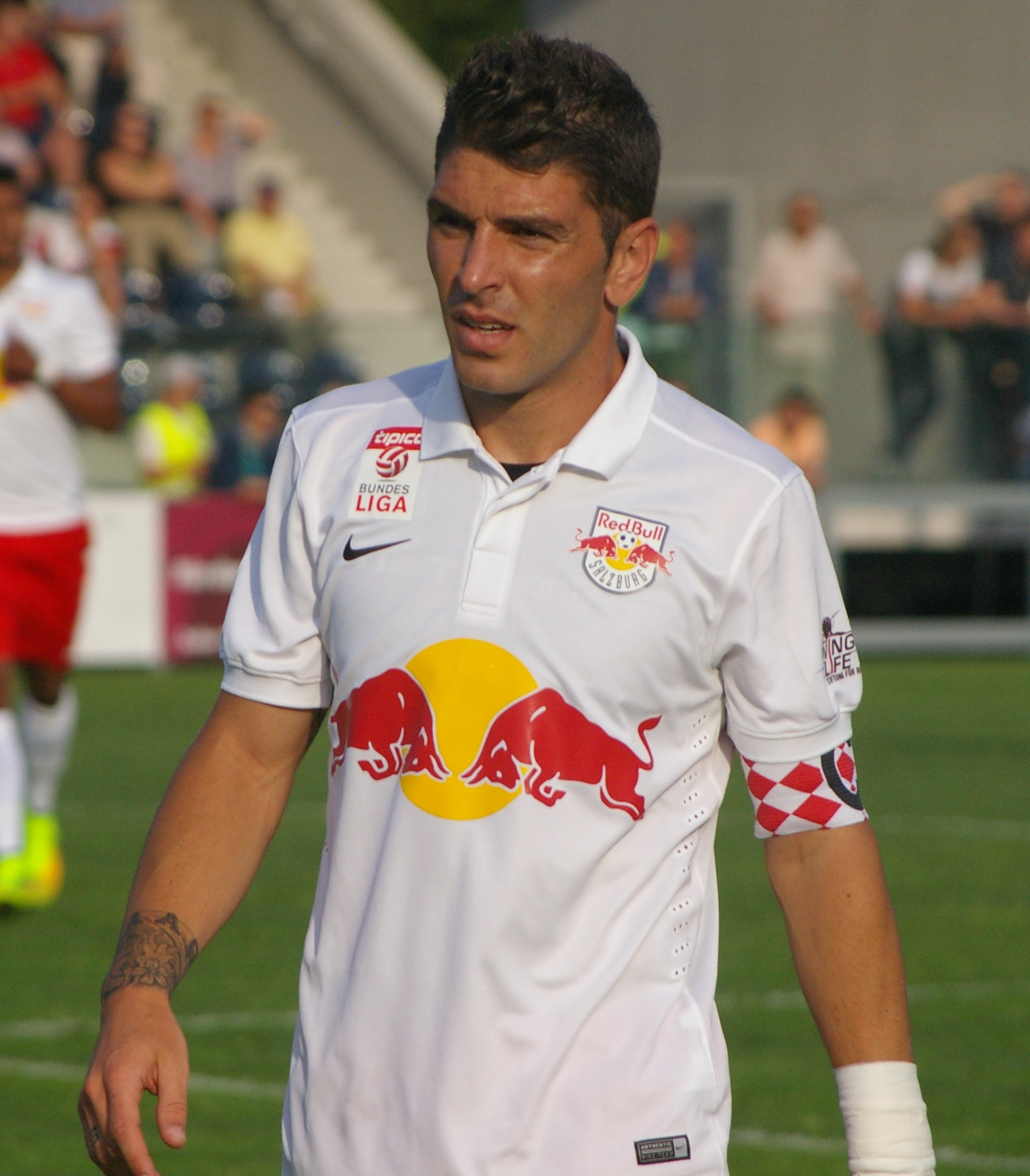 Testspiel gegen Schachtar Donezk-im Rahmen des Jubiläums 100 Jahre Salzburger AK